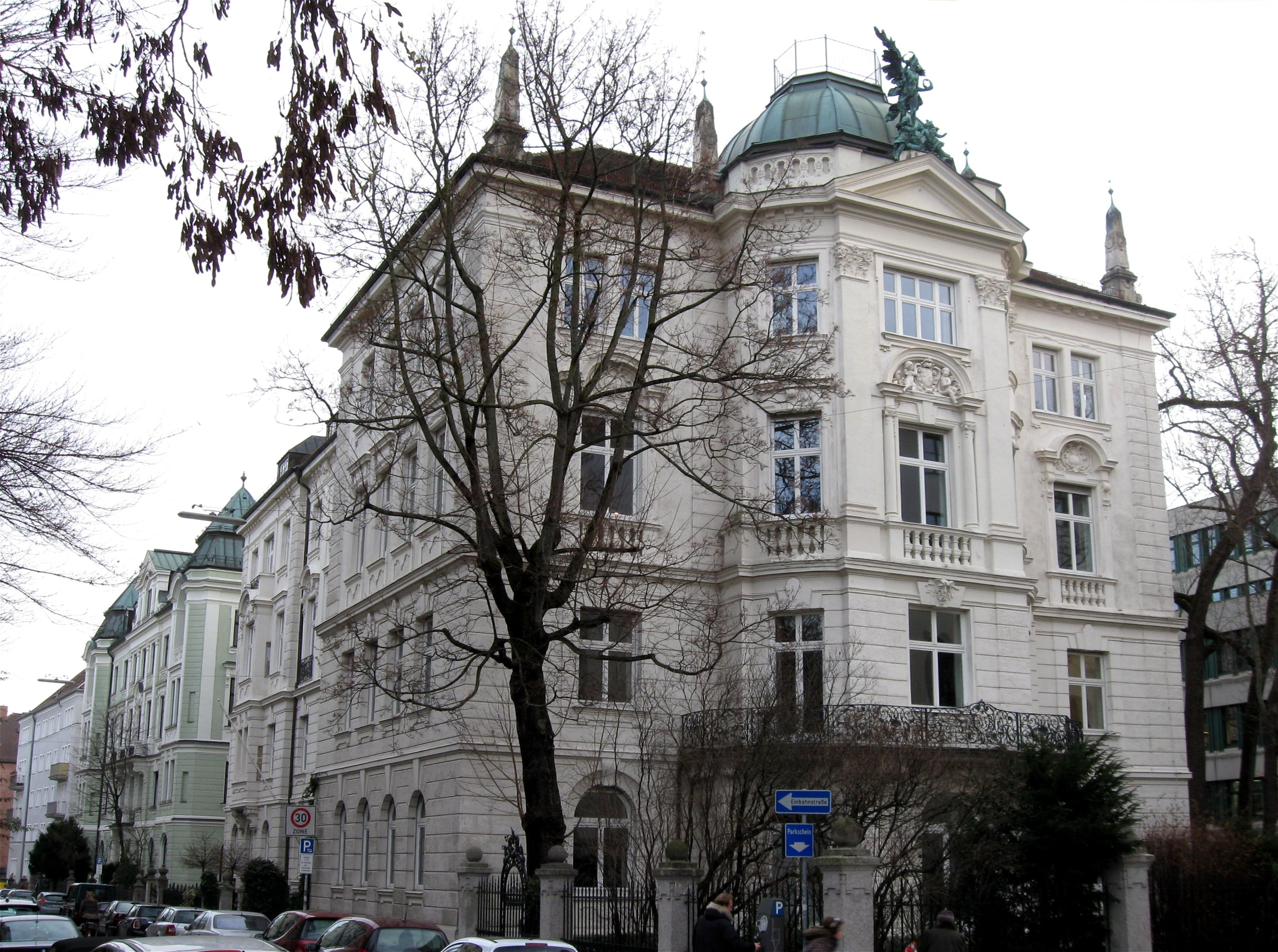 Schackstraße 2; Eckhaus, neubarock, reich gegliedert und stuckiert, mit polygonalem Risalit an der Leopoldstraße und plastischem Dekor, 1896/97 von Leonhard Romeis